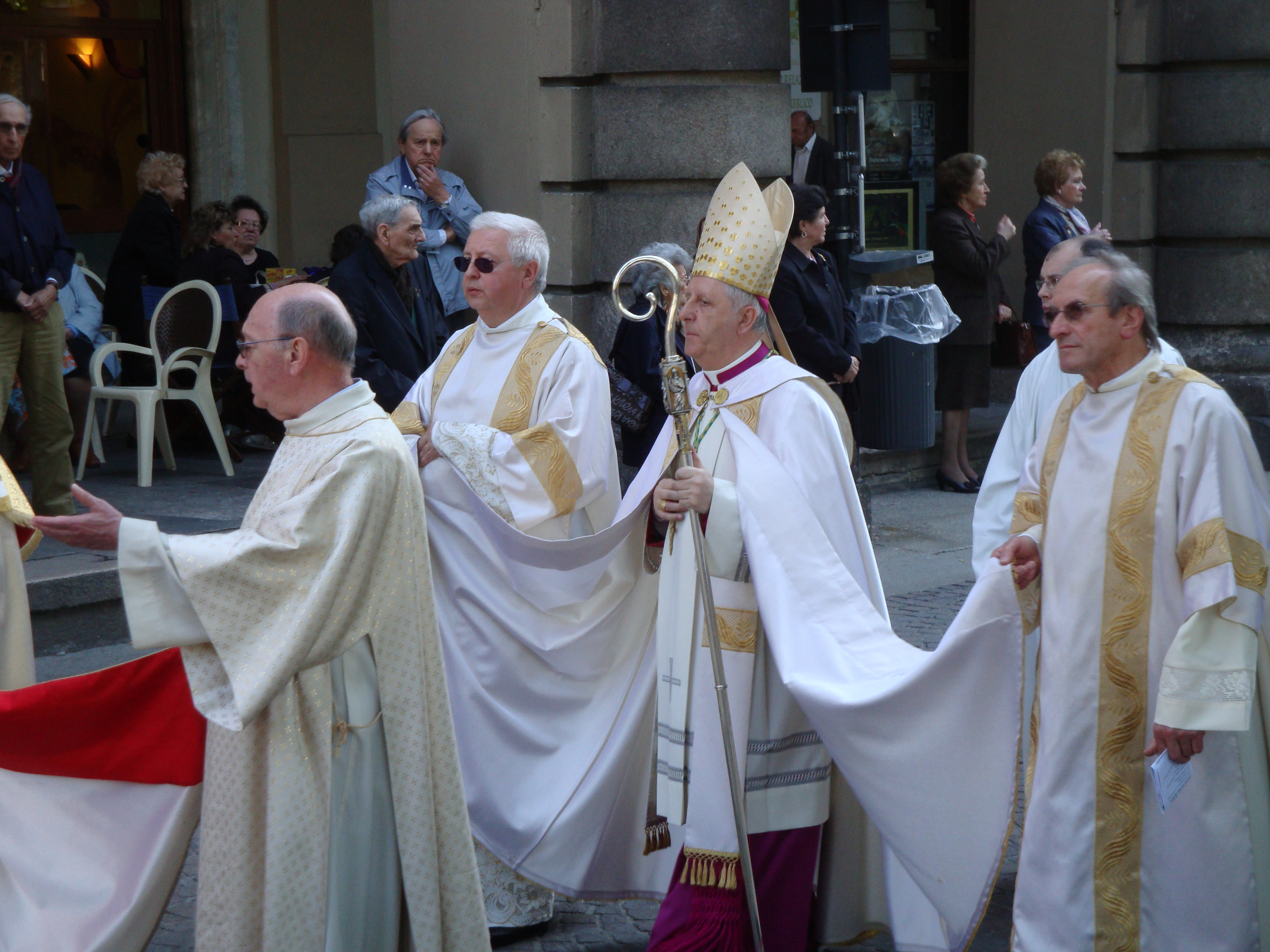 Autore: Tony Frisina - Alessandria